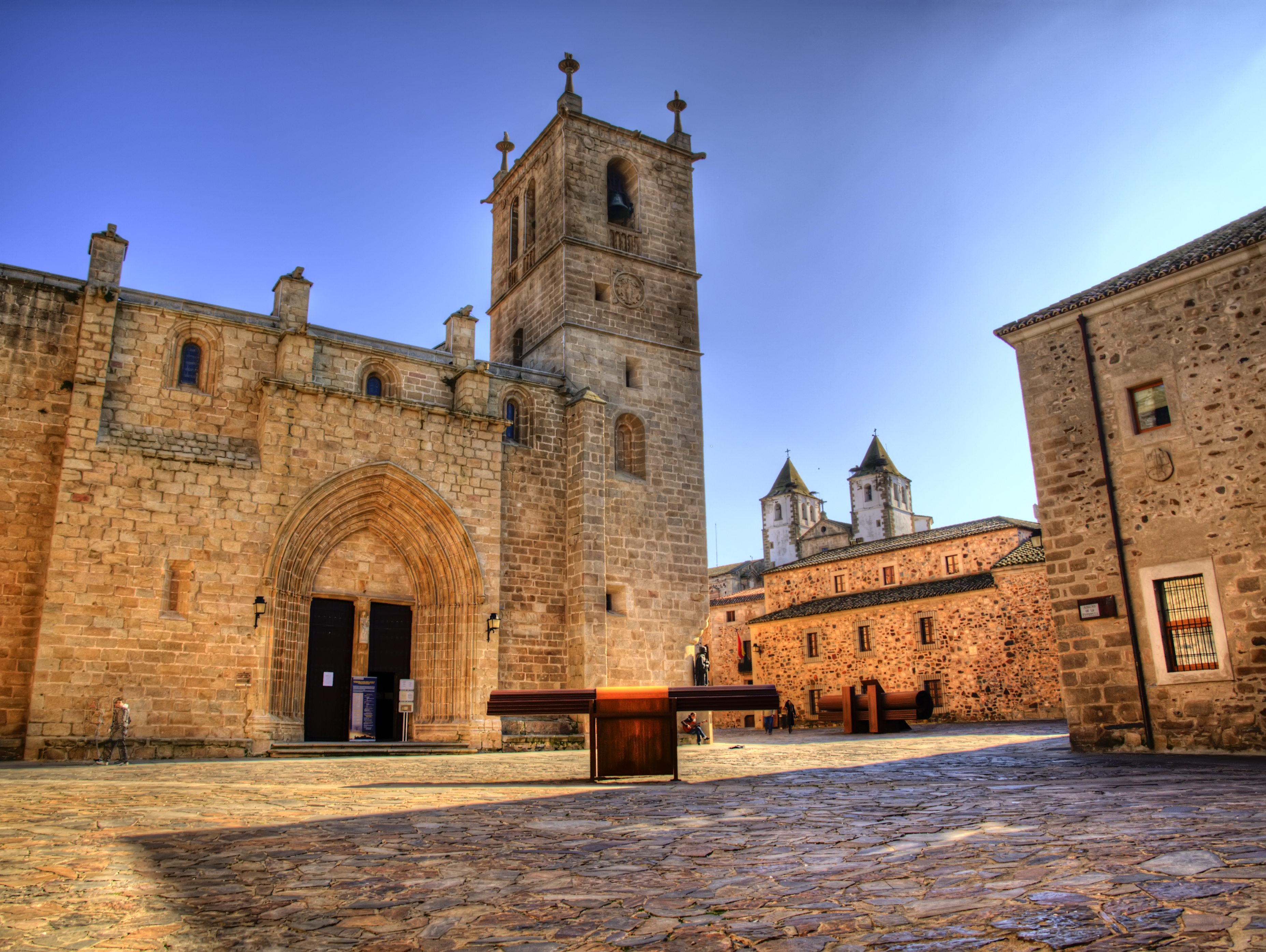 Caceres_11_1